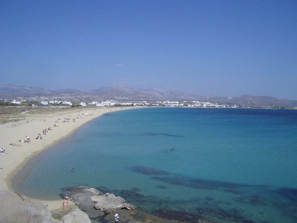 Agios Prokopios beach, Naxos island